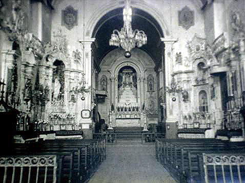 interior da antiga matriz de porto alegre, desaparecida no início do século XX